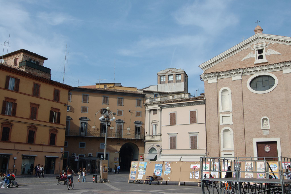 Jesi, Marche, ItaliaJesi: piazza della Repubblica